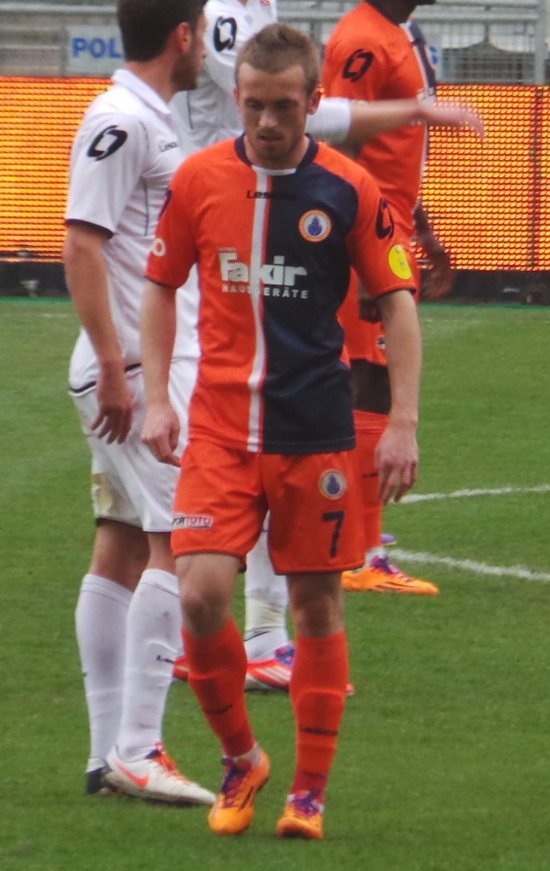 Edin Visca 2013-14 sezonunda İBB formasıyla